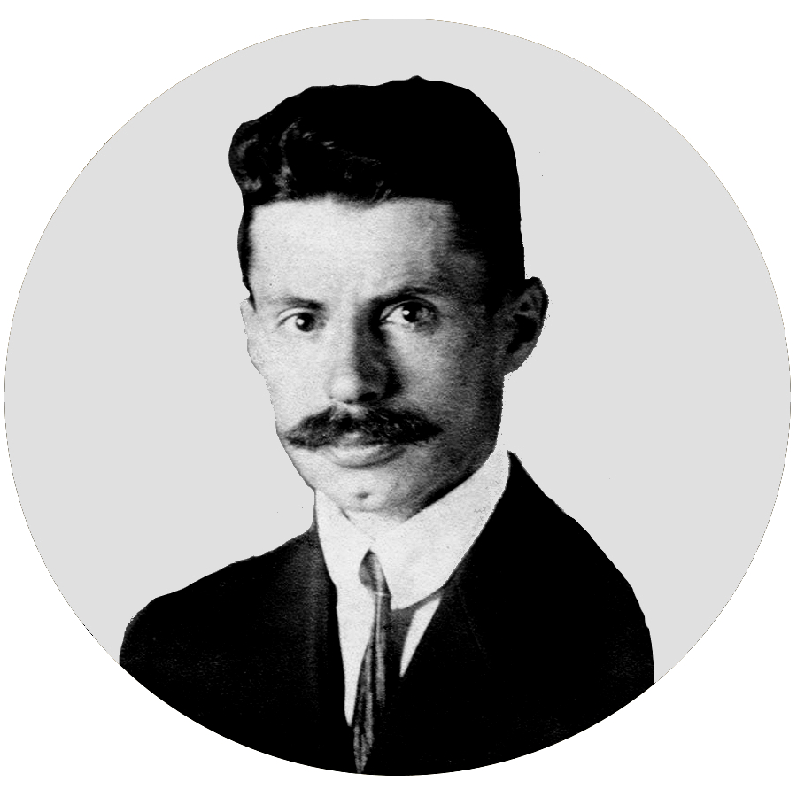 З файлу File:Vyacheslav Lypynsky, 1921.jpg